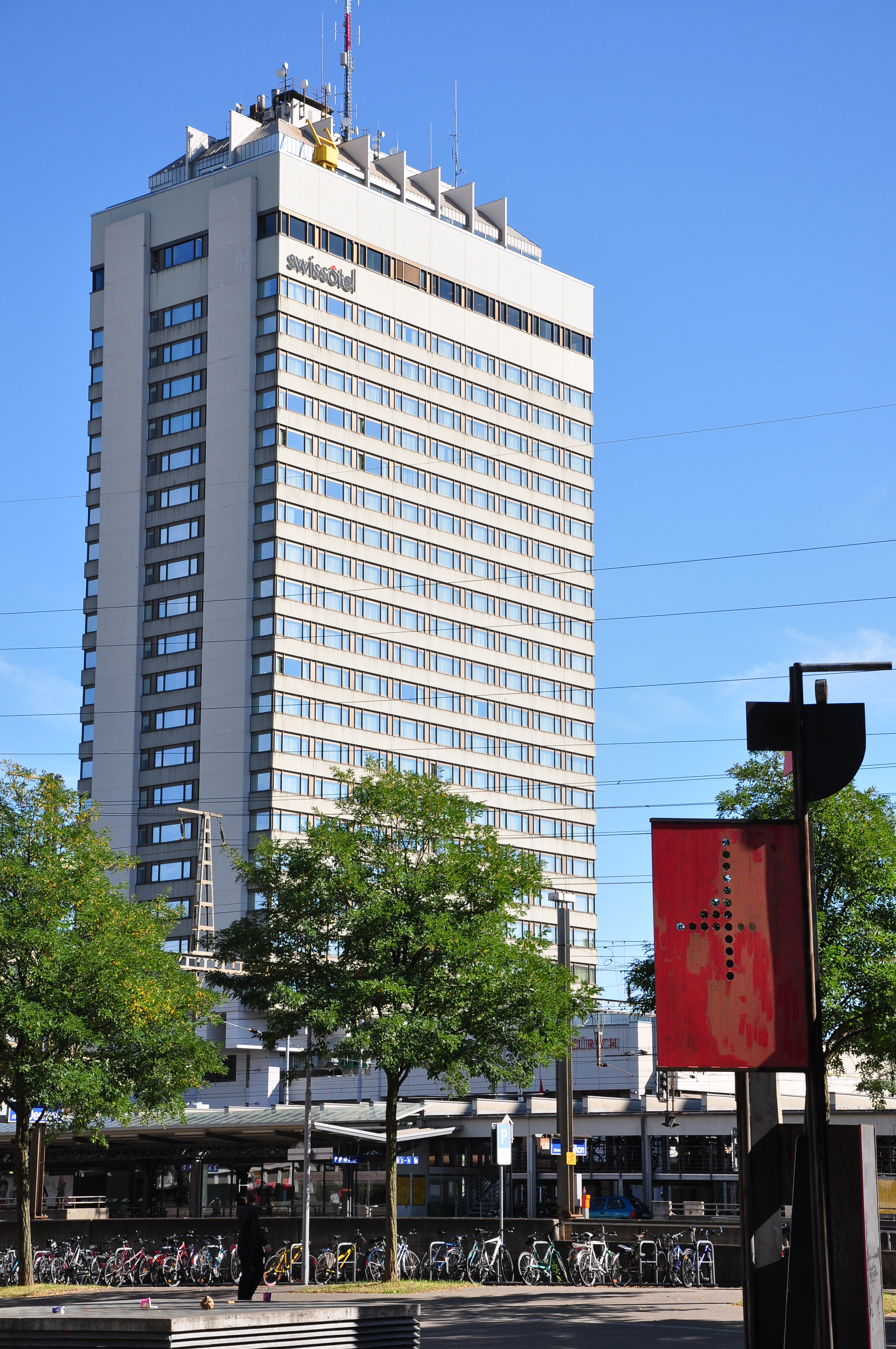 Zürich-Oerlikon in Switzerland, Oerlikon train station and Zürich Oerlikon Swissôtel in the background.